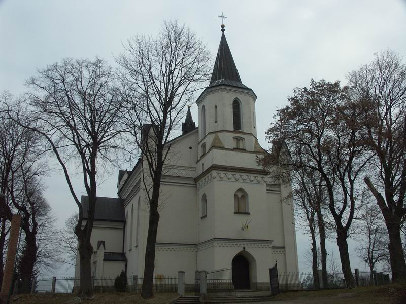 Neogotycki kościół w Brzyskach wybudowany pod koniec XIX wieku (powiat jasielski)